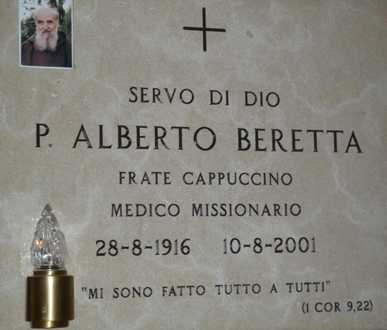 Lápide Frei Alberto Beretta